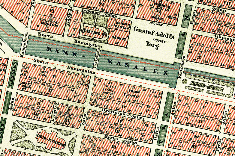 Bilden visar kvarteret Frimuraren i stadsdelen Inom Vallgraven i Göteborg år 1888. Kvarteret syns i mitten av kartan, söder om Stora Hamnkanalen, och omges av Södra Hamngatan, Östra Hamngatan, Drottninggatan och Korsgatan. I kvarteret ligger Frimurarlogen.